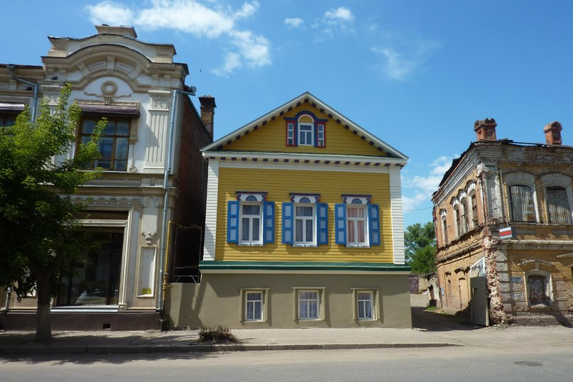 Музей чак-чака в доме Муллина